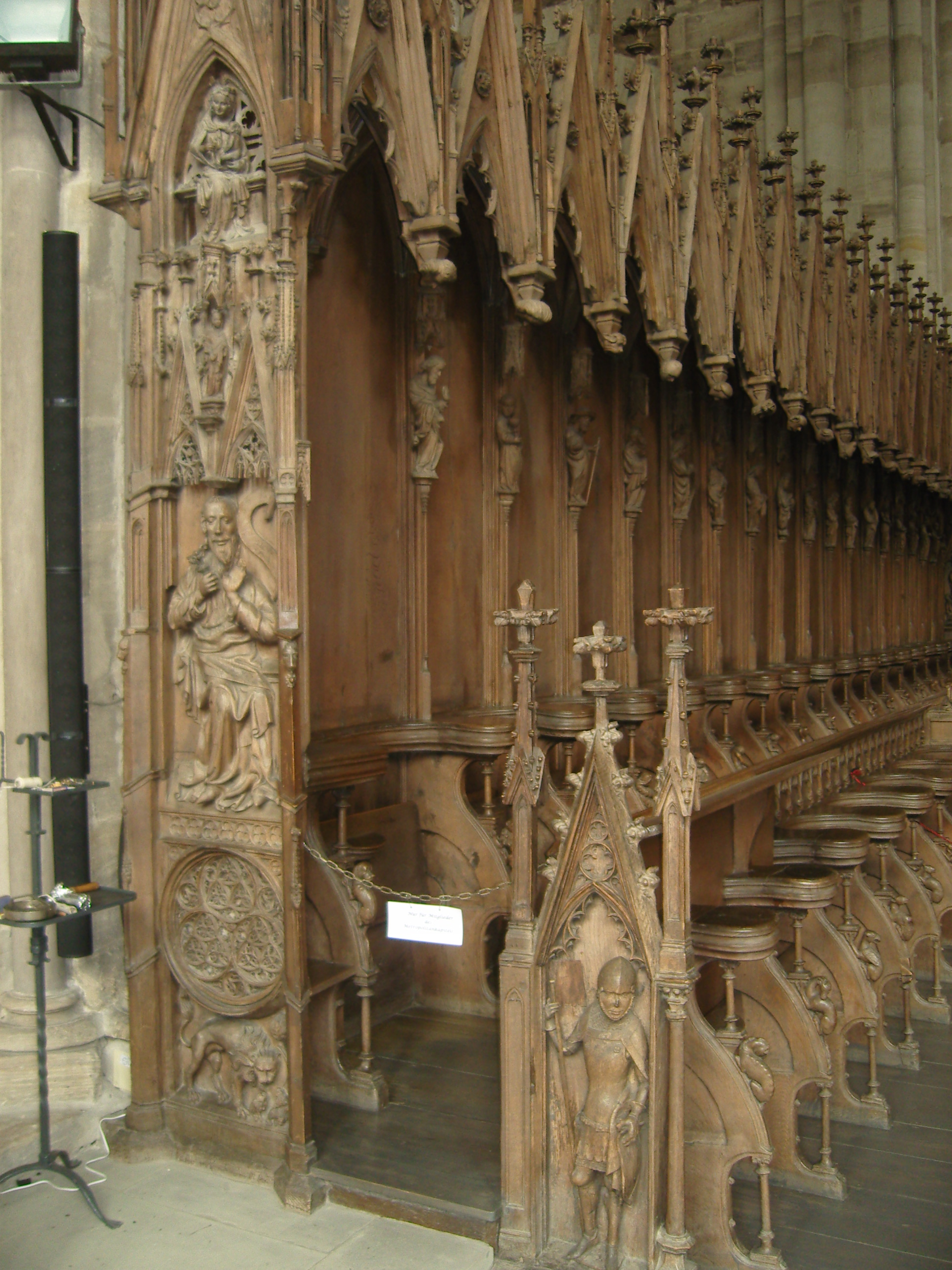 Bamberger Dom; ChorgestühlThis is a photograph of an architectural monument.